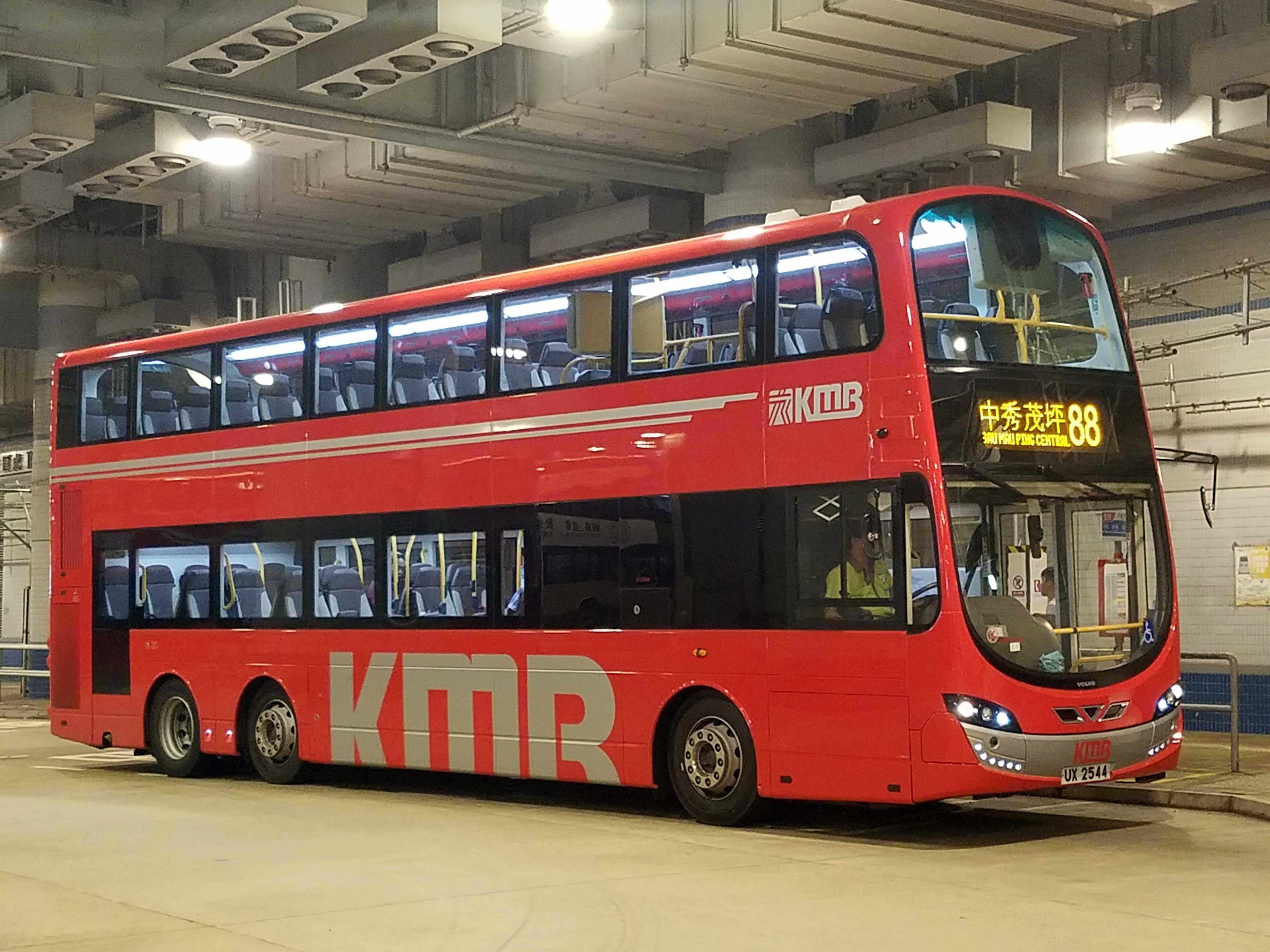 九龍巴士88線用車AVBWU581（配「城市脈搏」塗裝）抵達大圍站巴士總站